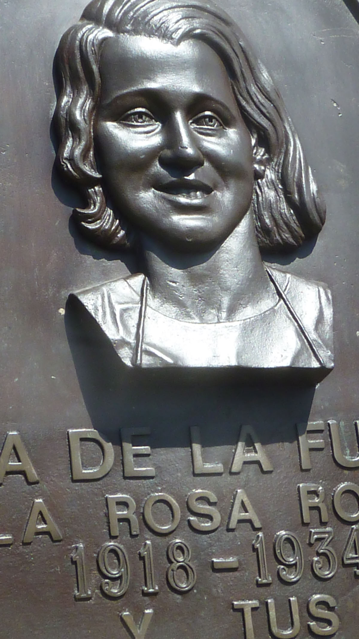 Oviedo